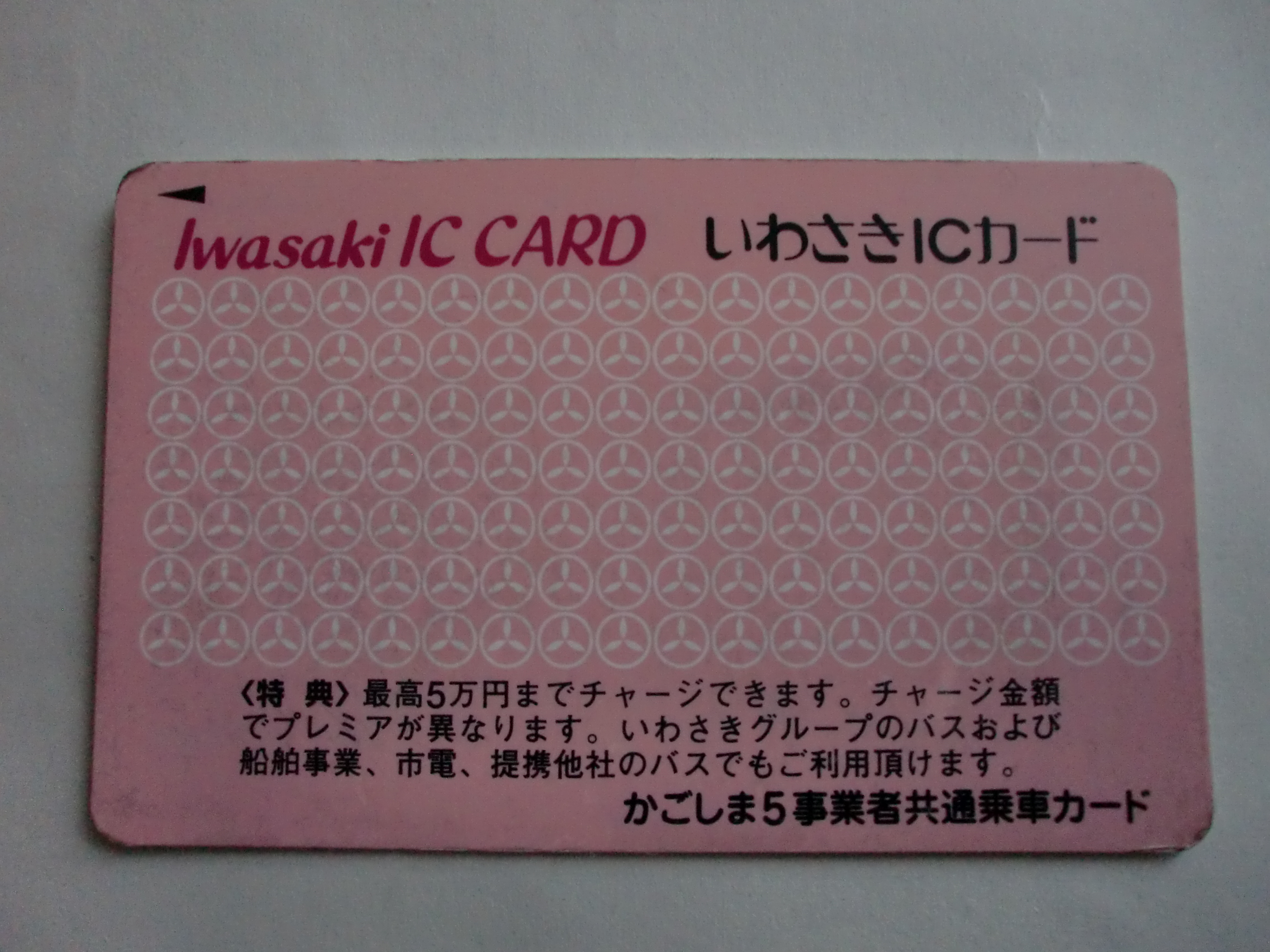 いわさきコーポレーショングループが発行している非接触型ICカード方式によるいわさきICカード